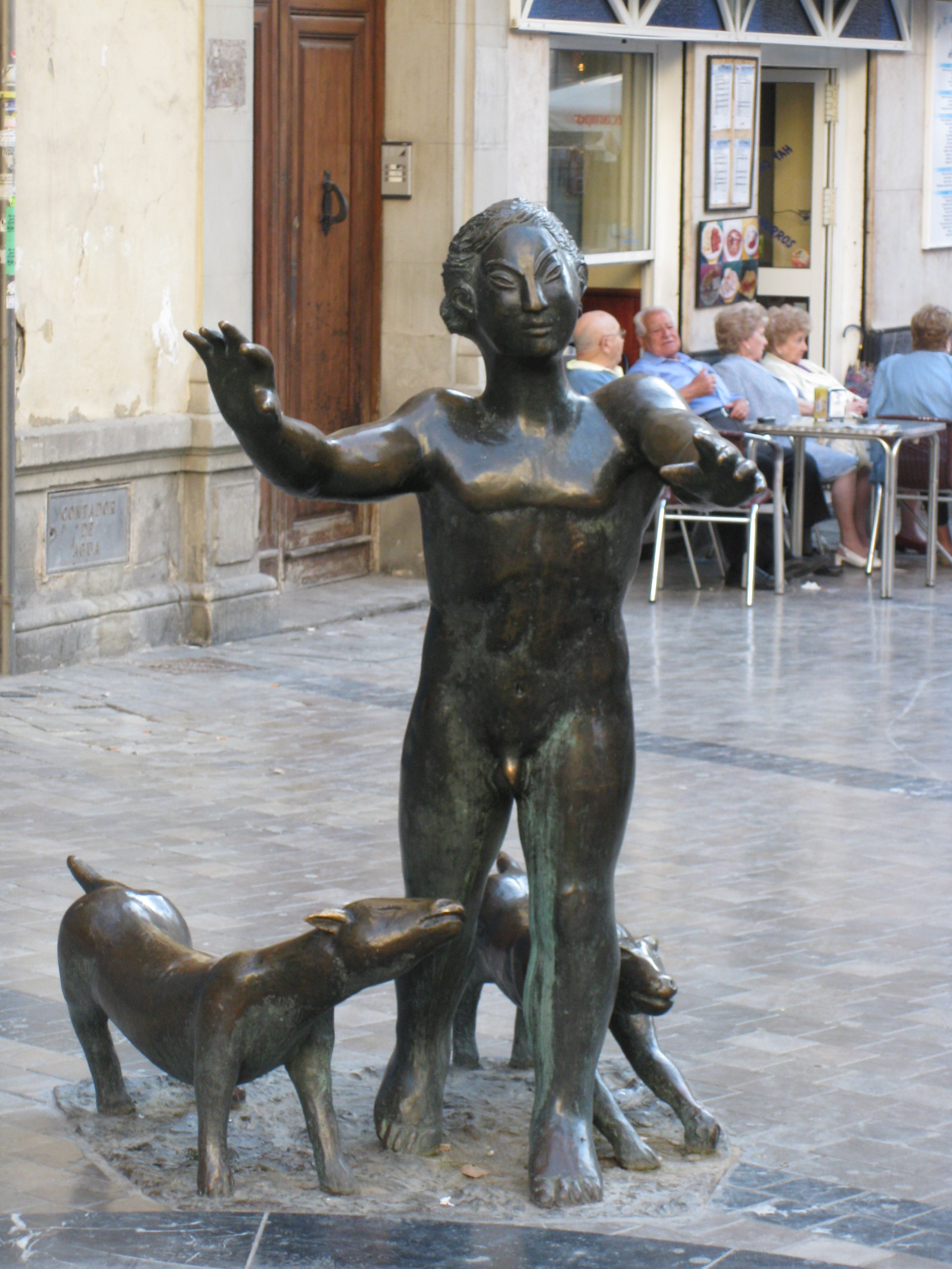 Escultura en plaza Uncibay, Málaga, España